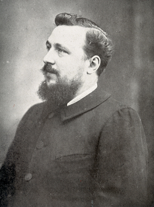 Portrait du sculpteur Adolphe Masselot